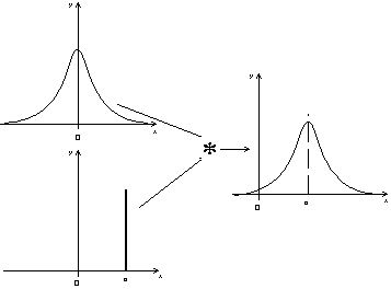 produit de convolution d'une fonction par un dirac